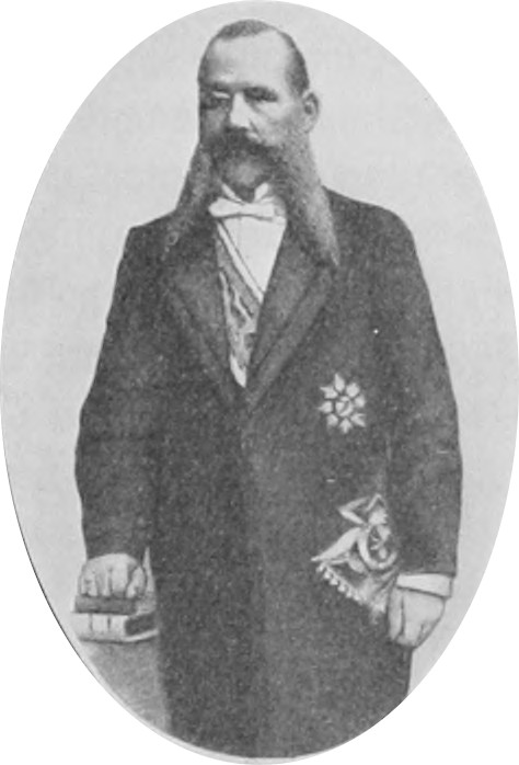 Jovan Ristić, primer ministro de Serbia y regente.